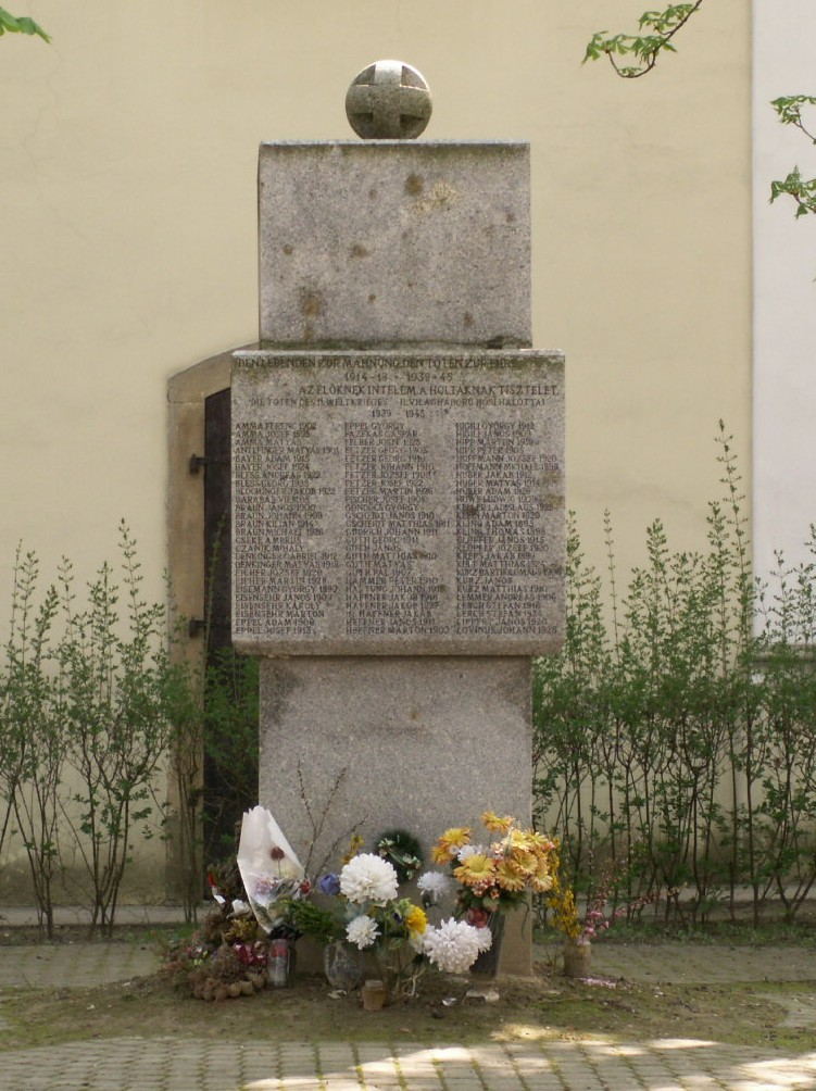 Ez a kép Tevel község világháborús áldozatainak emlékművét ábrázolja. Saját magam készítettem.